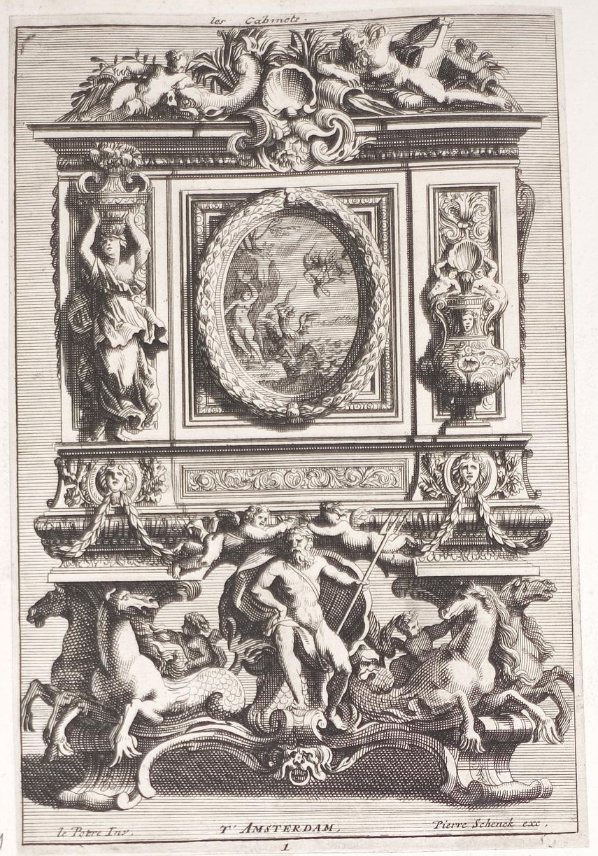 Grafik aus dem Klebeband Nr. 9 der Fürstlich Waldeckschen Hofbibliothek Arolsen Jean Le Pautre: Entwurf für einen Schrank